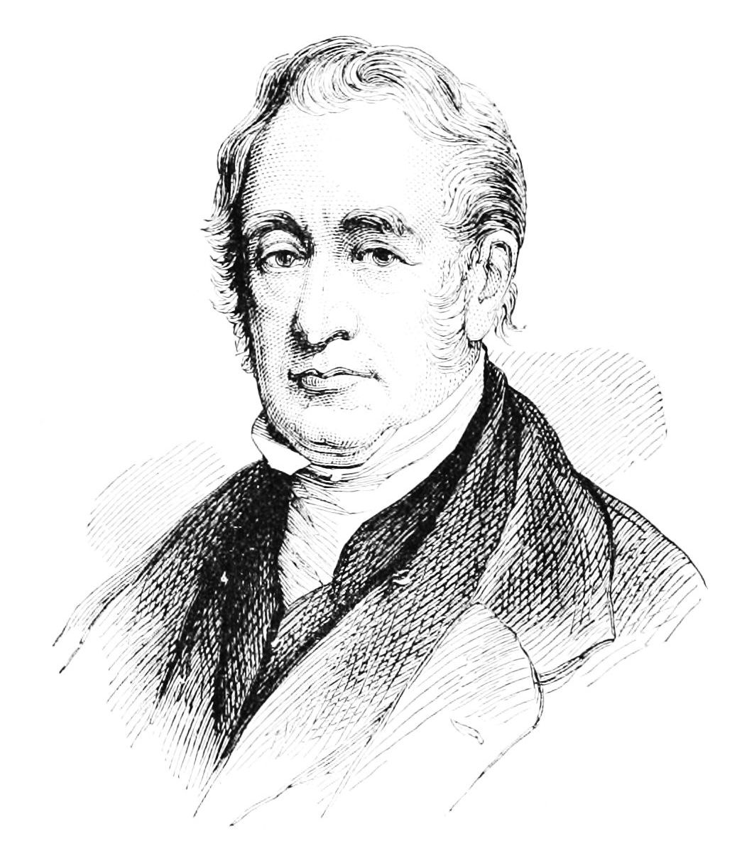 John Stephenson